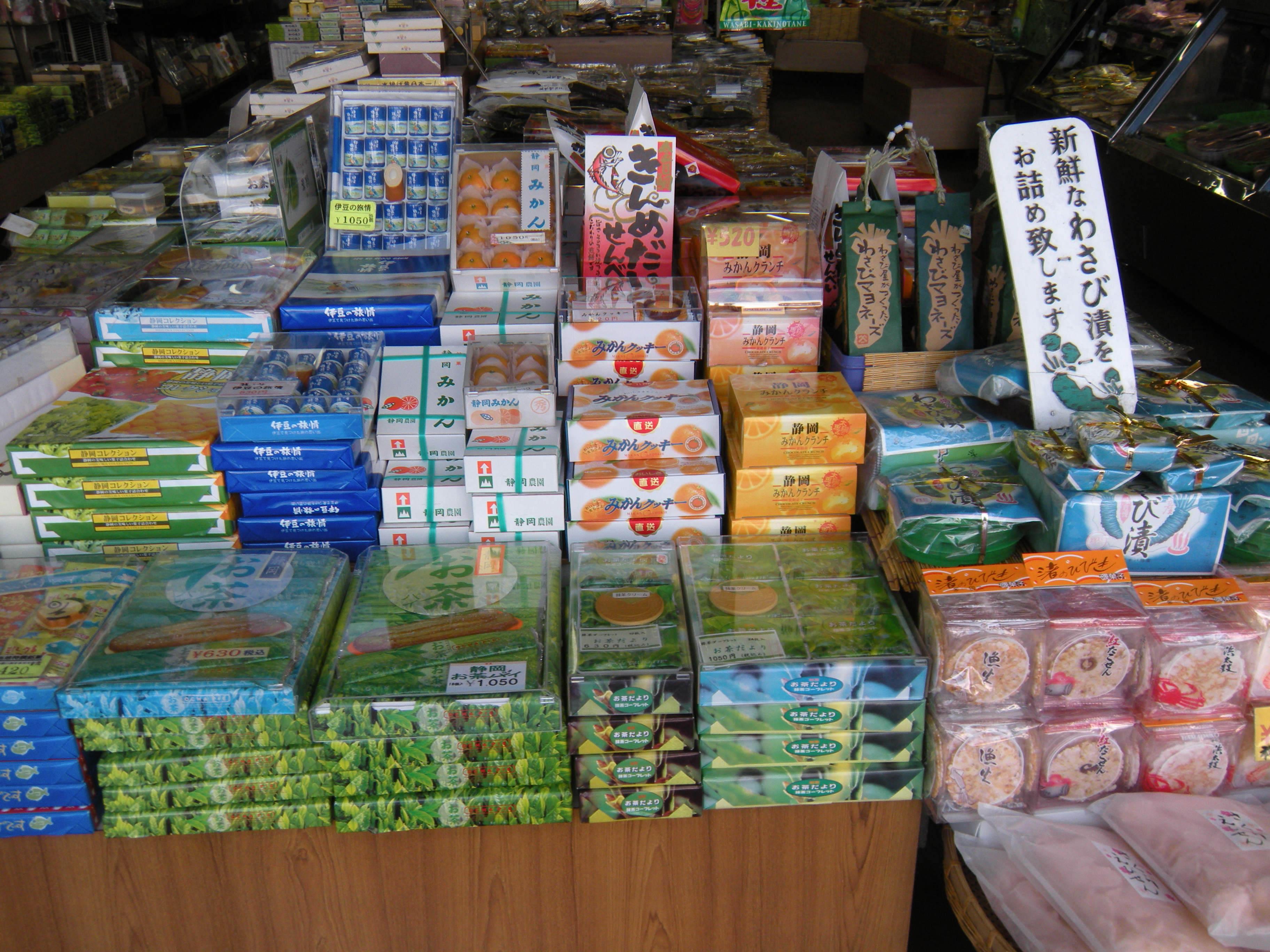 Nihon